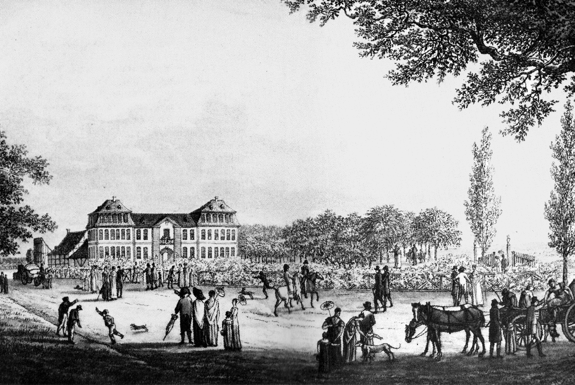 Der Sandhof war ein im Jahr 1193 erstmals urkundlich erwähnter Gutshof im Wildbann Dreieich bei Frankfurt am Main. Der Hof war rund 600 Jahre lang im Besitz des Deutschen Ordens. Das abgebildete Herrenhaus wurde etwa im Jahr 1750 errichtet. Im Zweiten Weltkrieg wurden die Gebäude stark beschädigt und später abgerissen. Der ehemalige Standort des Sandhofs liegt heute auf dem Gelände des Universitätsklinikums Frankfurt am Main.